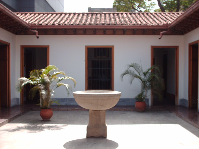 Patio de la casa natal de Simón Bolívar